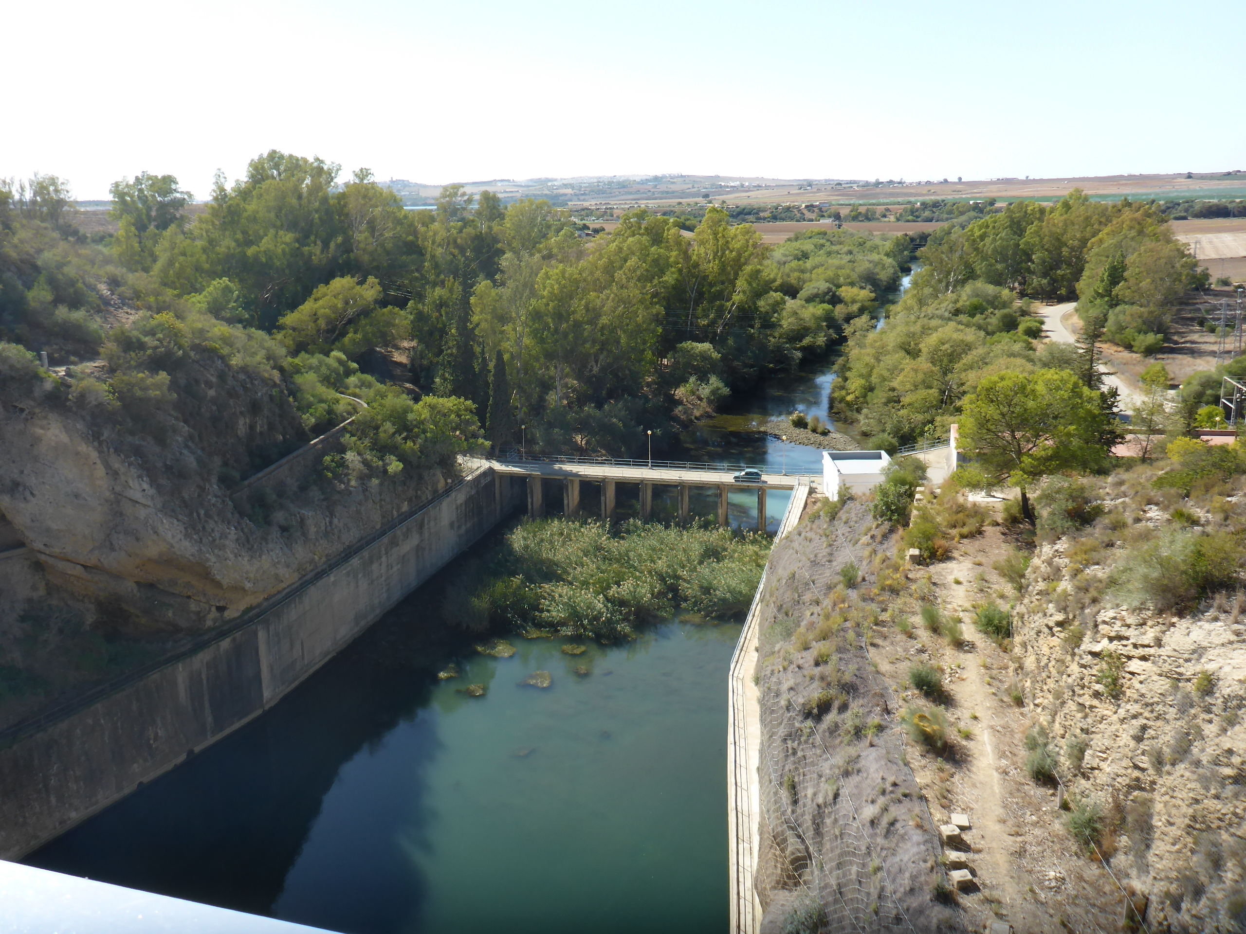 Río Guadalete al salir del embalse de Bornos (Andalucía, España)